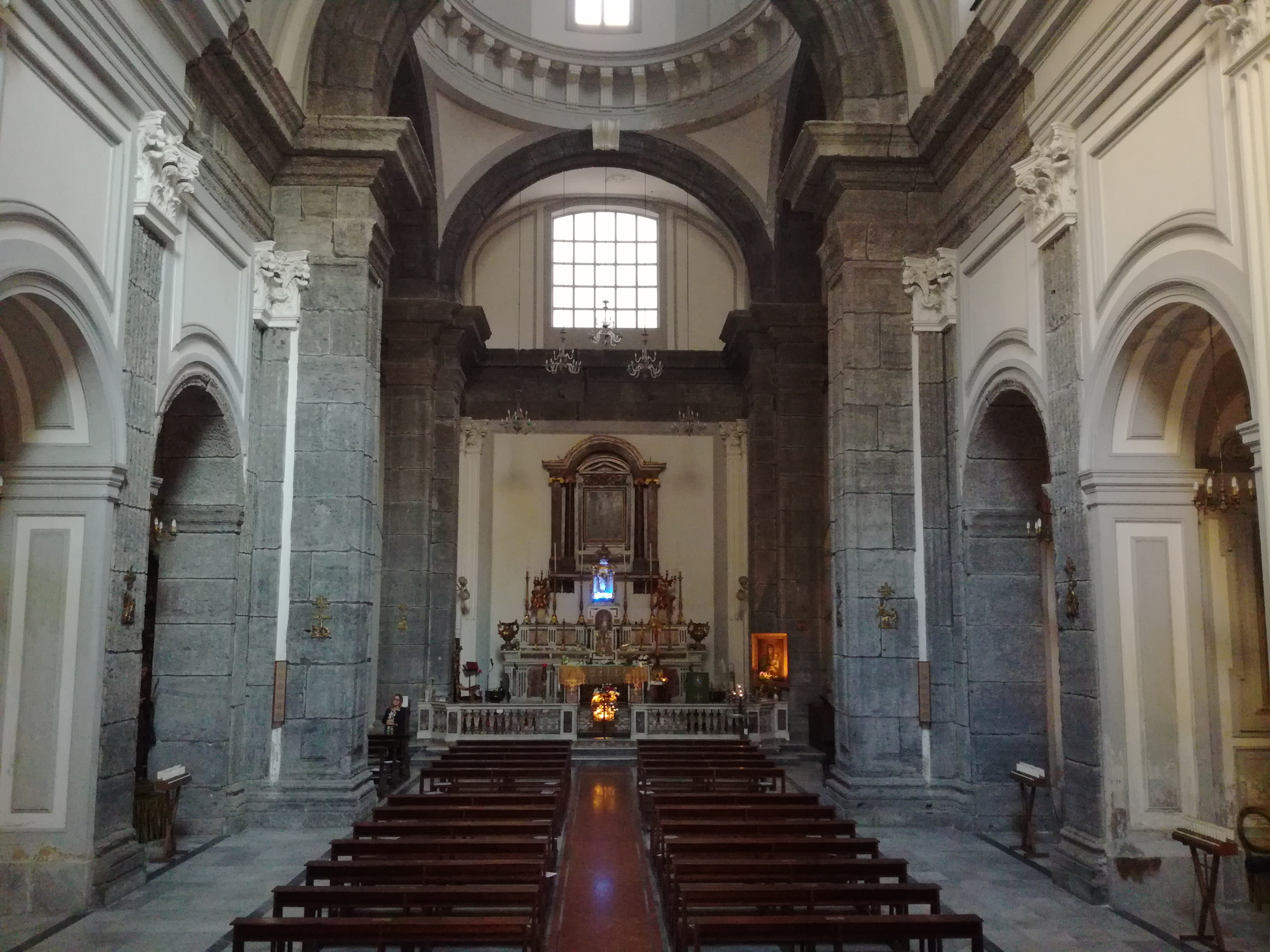 Onofrio Vecchi, l'interno